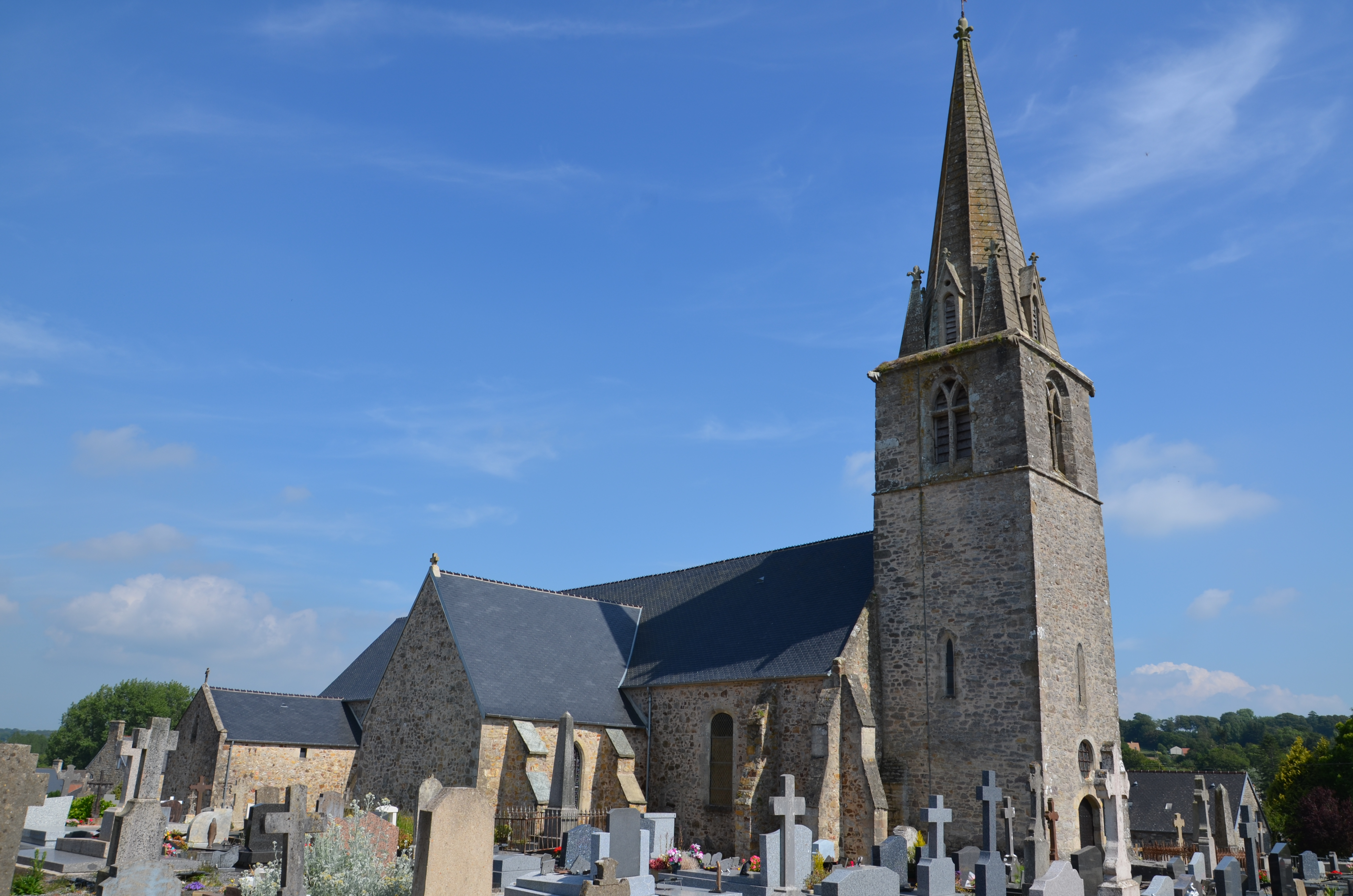 Église Notre-Dame de Rauville-la-Bigot.